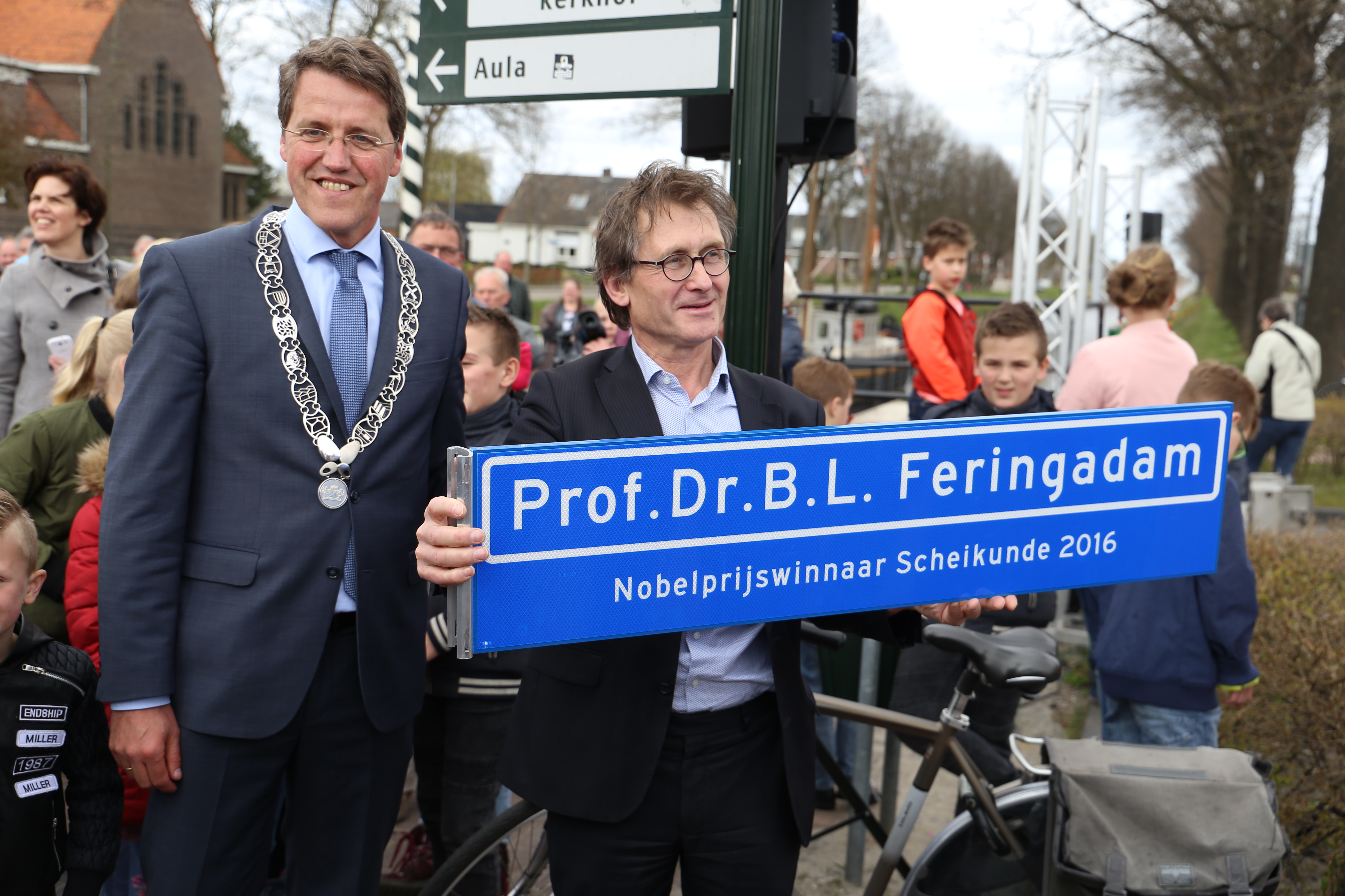 Op 6 april 2017 werd Nobelprijswinnaar Ben Feringa door de gemeente Emmen geëerd door de Dam in het hart van zijn geboortedorp Barger-Compascuum naar hem te vernoemen.